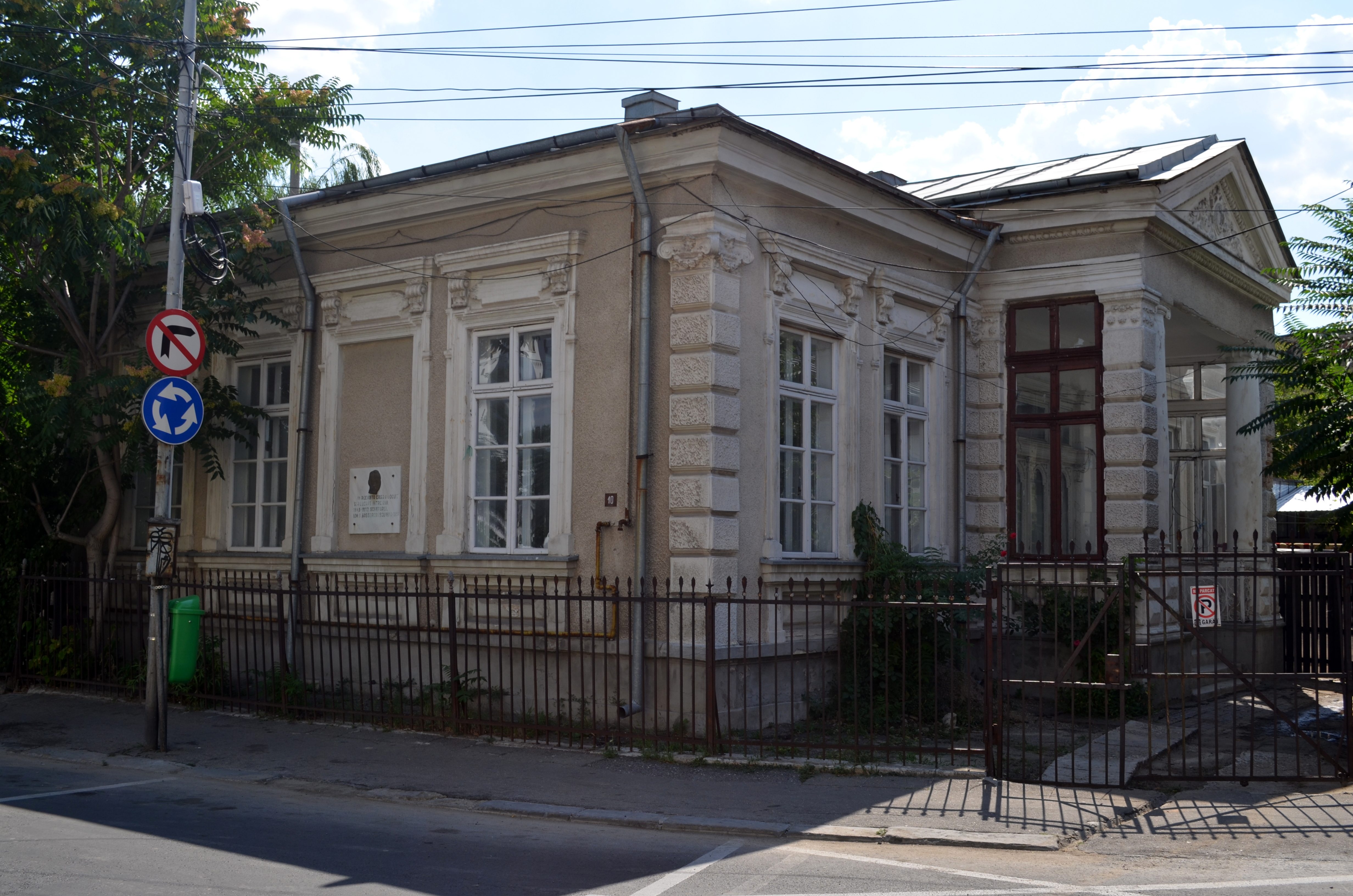 Casa în care a locuit scriitorul I. A. Bassarabescu, Str. Ștefan cel Mare nr. 10, Ploiești